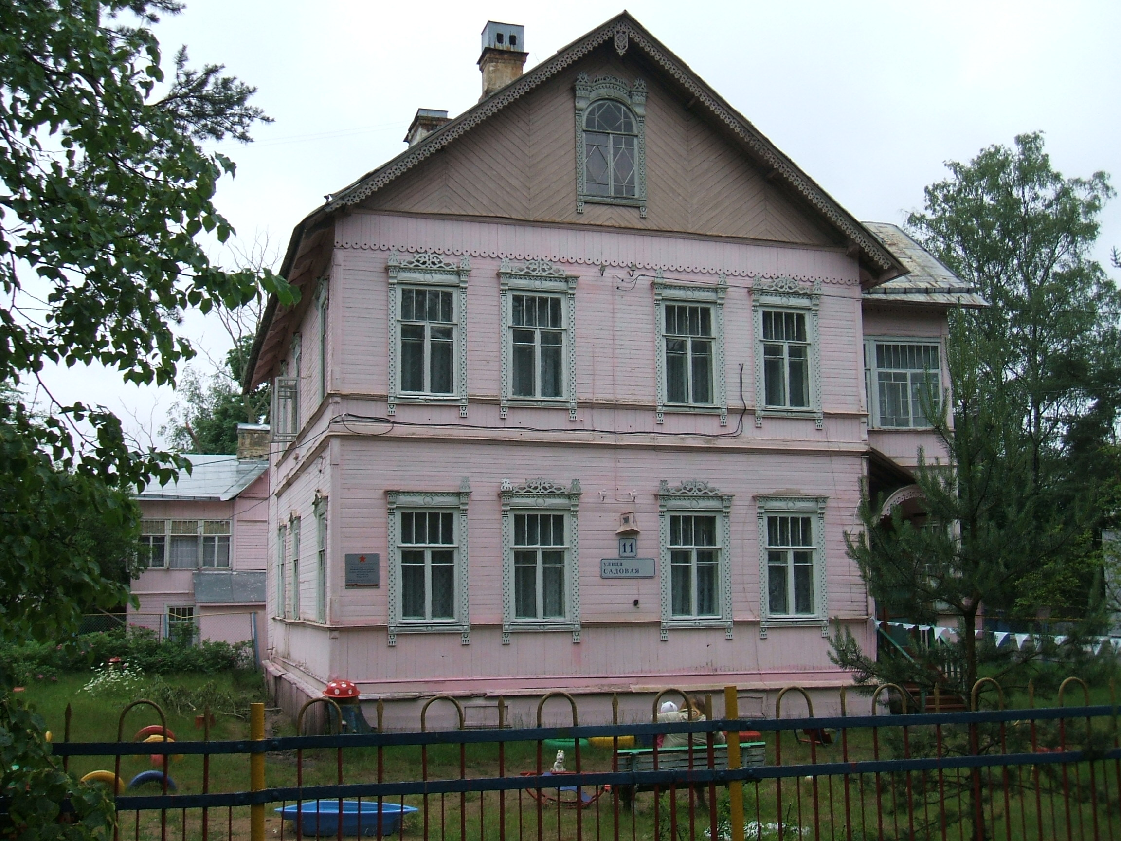 Здание детского сада "Очаг" (1942-1944г.г.) в п. Песочный СПб